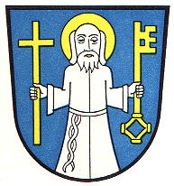 Wappen der Titularstadt Gehrden von 1955, heute ein Stadtteil von Brakel